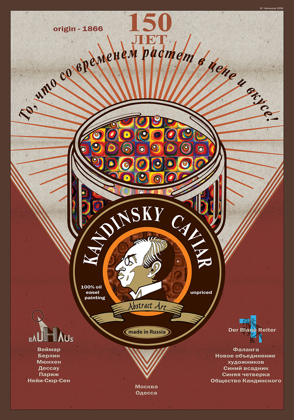 КАНДИНСКИЙ. Оригинальная и комп. графика, 70х100 см. 2016 г